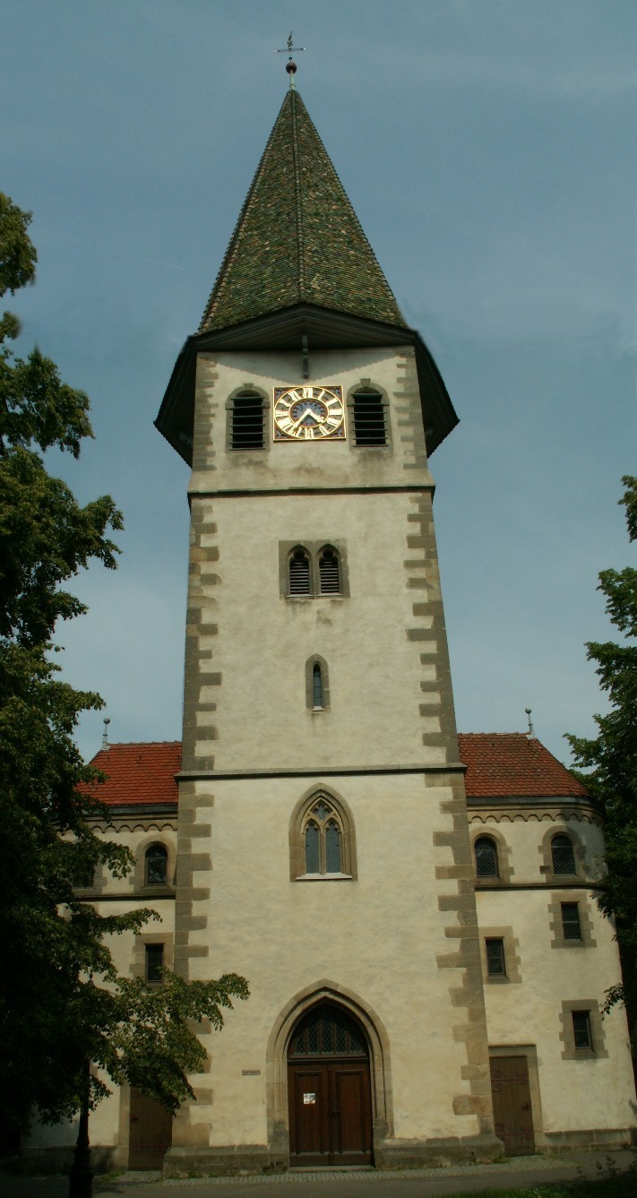 Martin church in Stuttgart-Plieningen, Germany